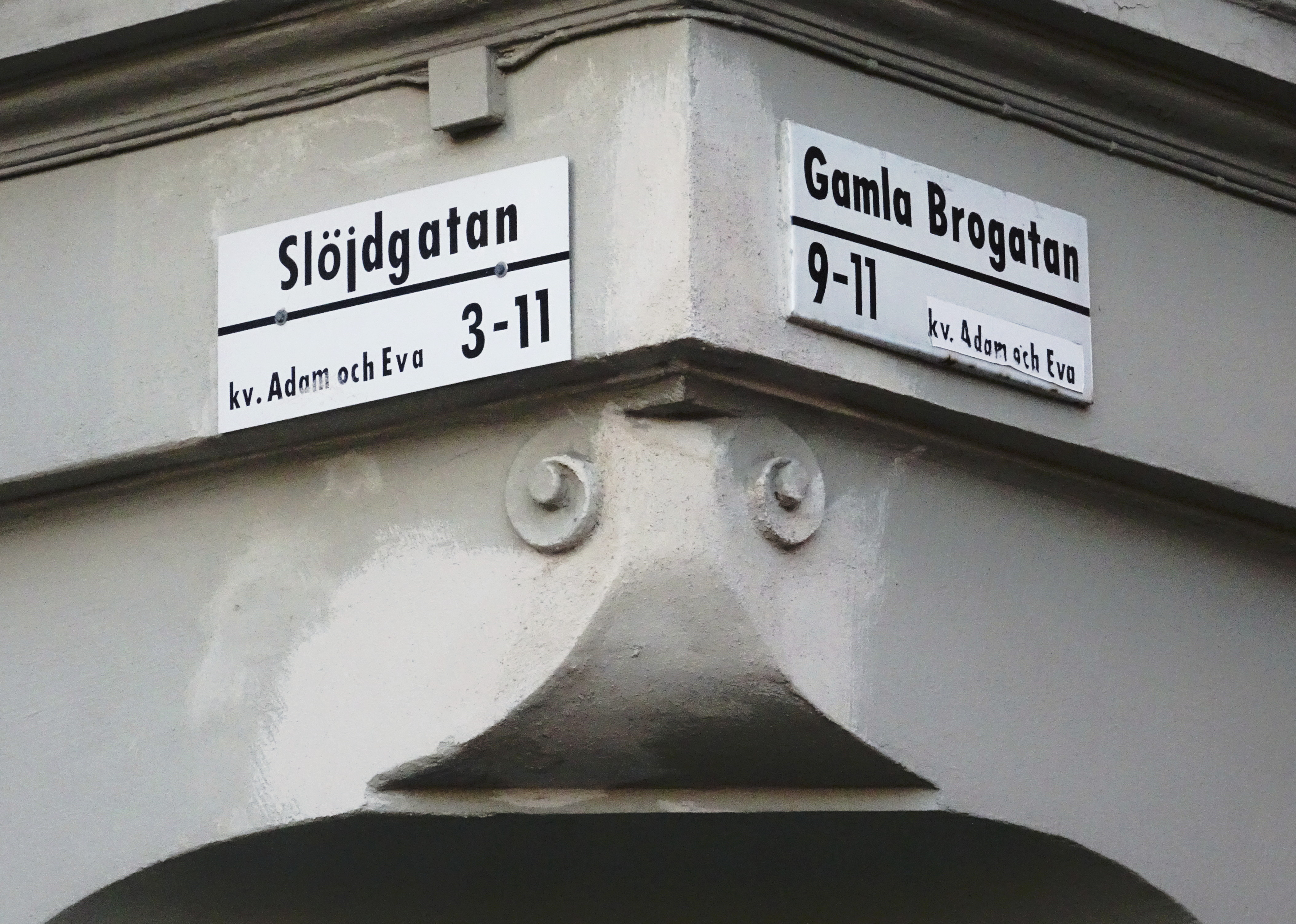 Hörnet Slöjdgatan, Gamla Brogatan